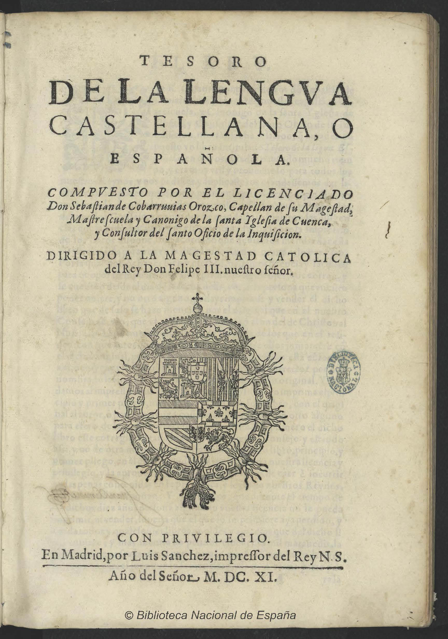 Tesoro de la lengua castellana, o española [Texto impreso] / compuesto por ... Sebastian de Cobarrubias Orozco .... - En Madrid : por Luis Sanchez ..., 1611. - [ 10], 602,79, [1] h. ; Fol. - Signatura R/6388